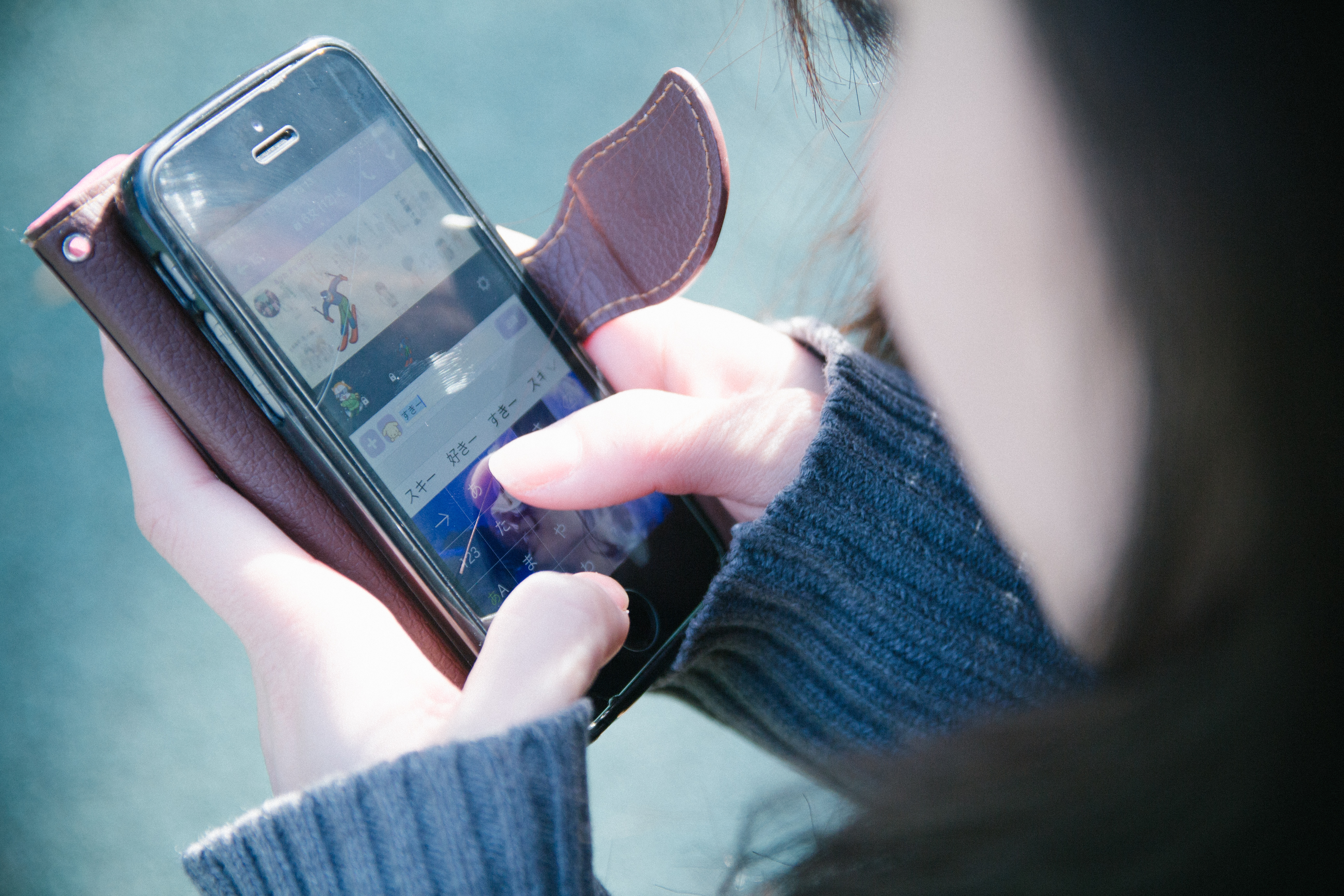 顔出しNG女子高生